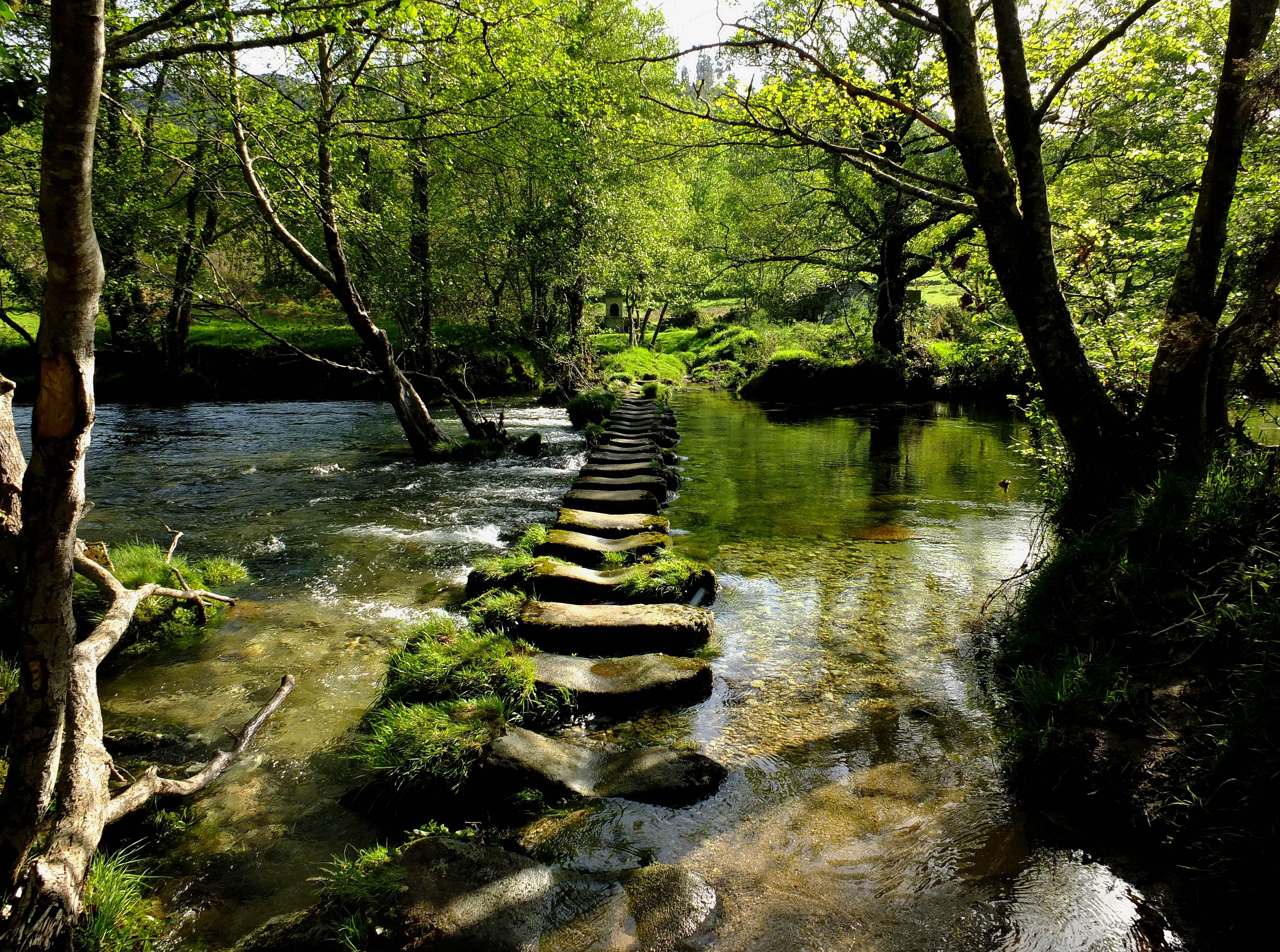 Pontevedra, Galicia, España